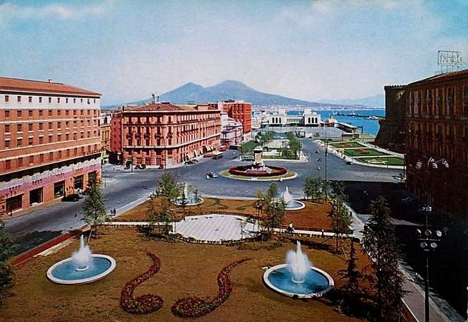 Napoli, Piazza Municipio nella sua sistemazione realizzata da Achille Lauro nel 1956. Cartolina a colori. Autore sconosciuto.